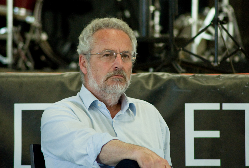 Maurizio Pallante a Cintello (VE) nel giugno 2012